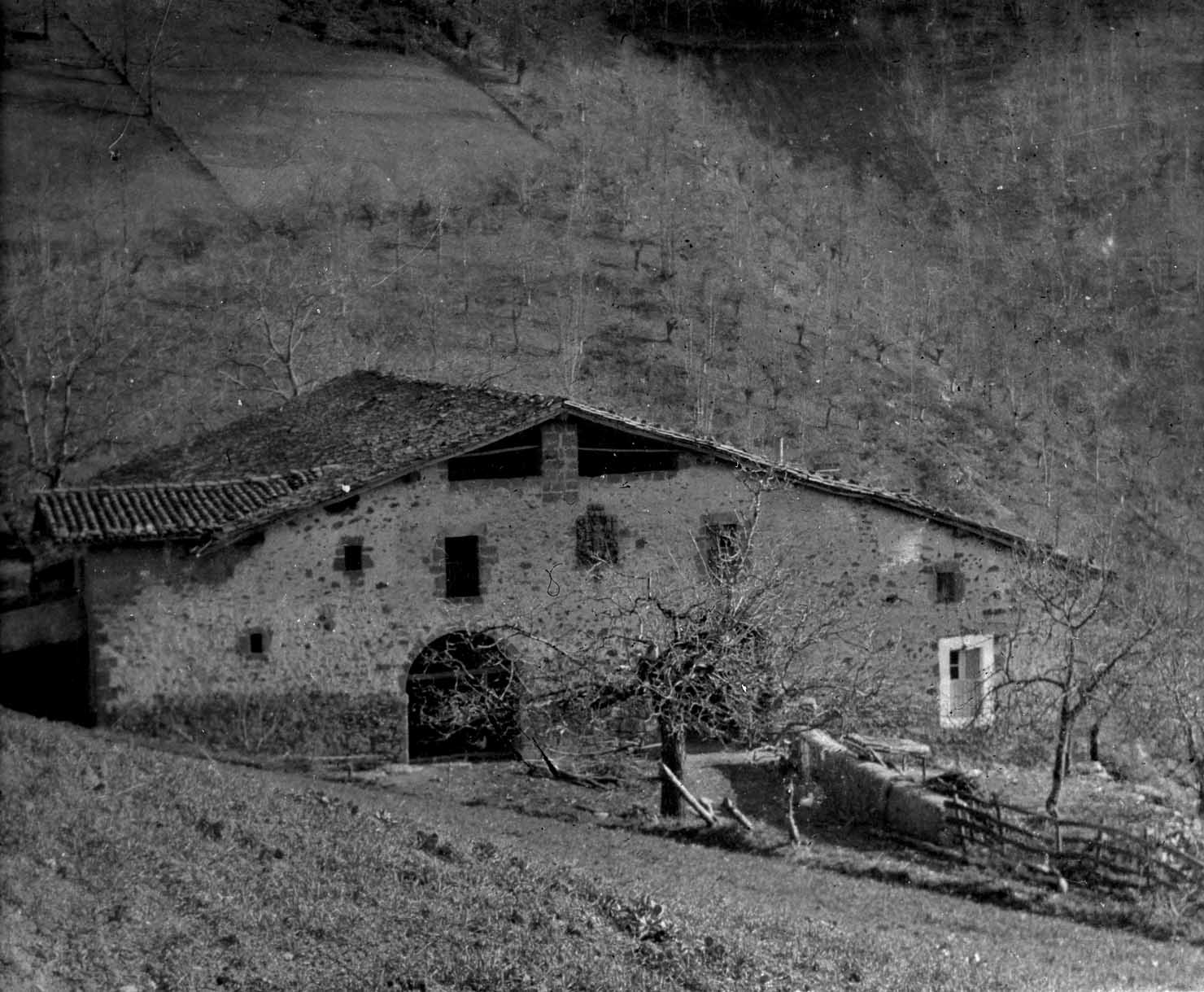 Antzuolako Iturbe Haundi baserria.